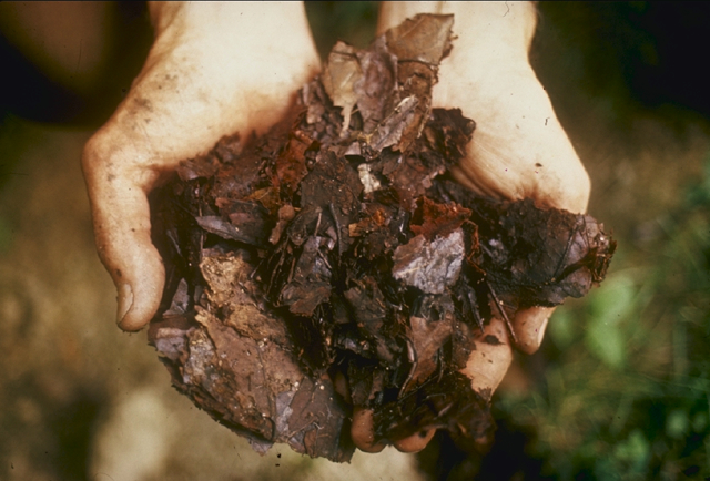 Compost1